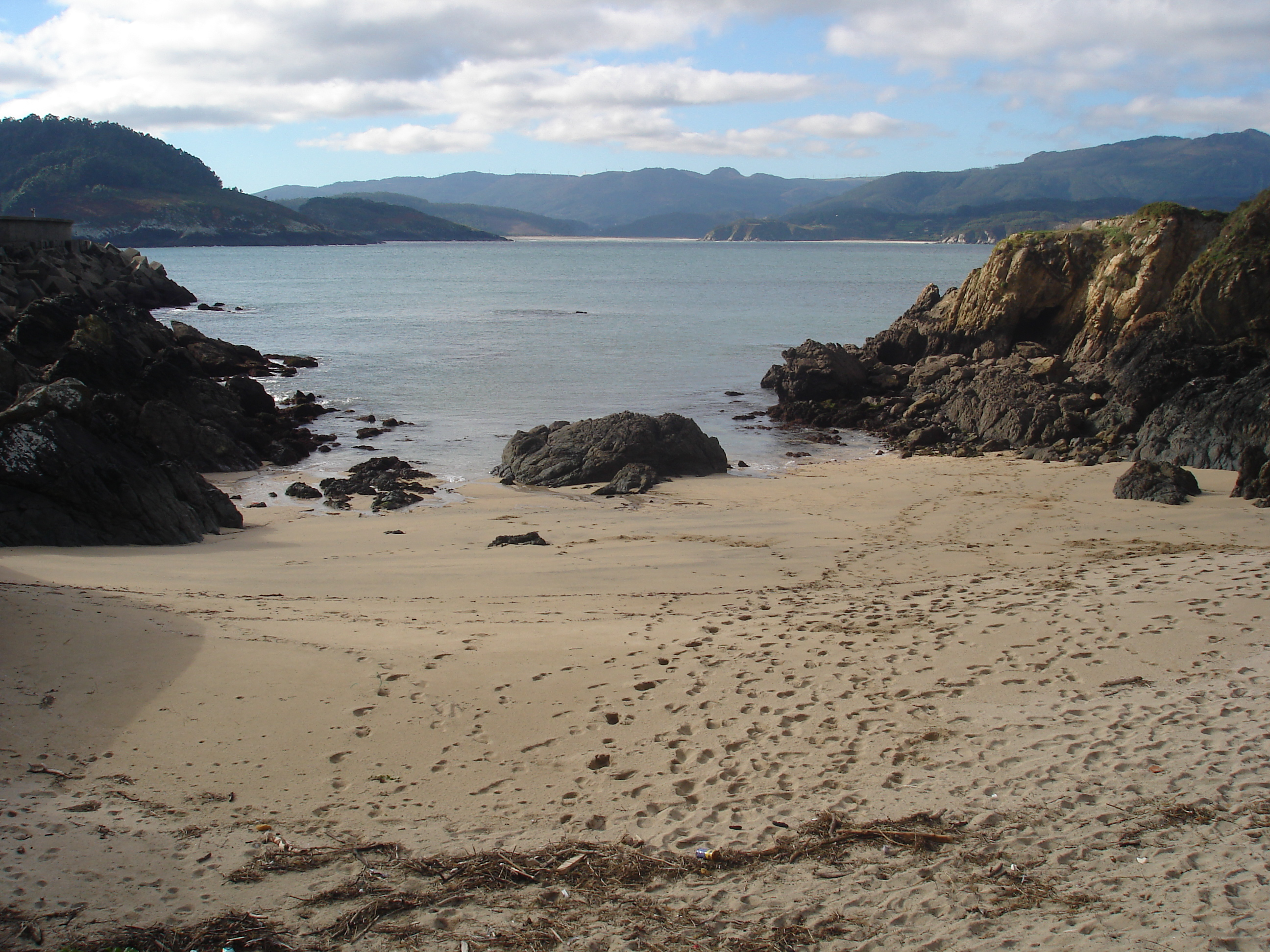 Praia de Orbeiro (Praia de Santa Cristina ou Praia dos Namorados) en Espasante, no concello de Ortigueira.